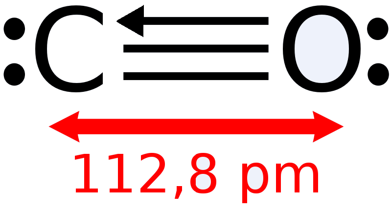 Estructura Lewis del Monóxido de Carbono indicando su enlace dativo correspondiente.